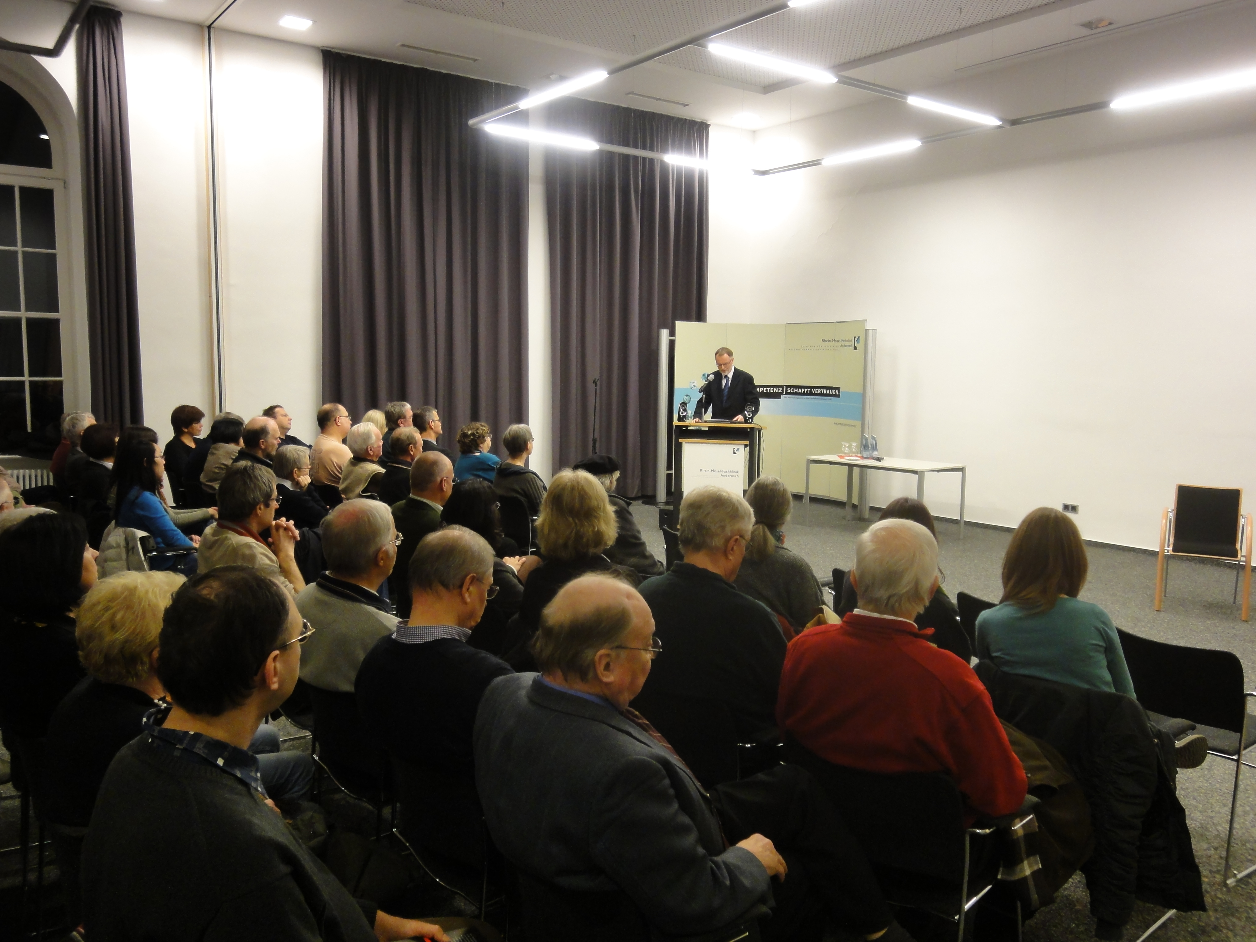 Gedenkveranstaltung an der Rhein-Mosel-Fachklinik Andernach am 27.1.2012 zum Gedenktag der Opfer des Nationalsozialismus. Zu sehen der ärztliche Direktor der RMF Dr. Elsner bei seiner Begrüßungsrede.